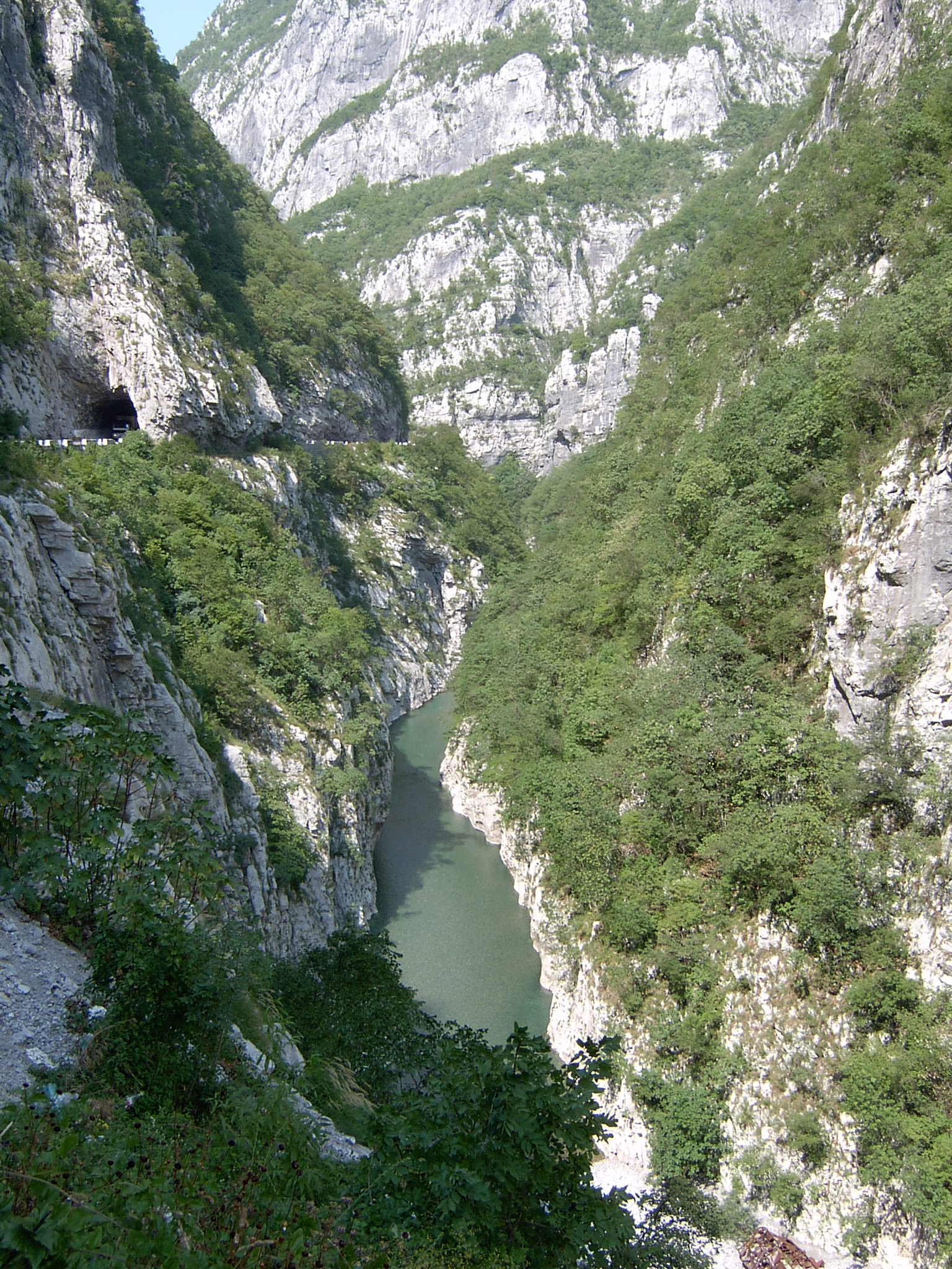 Kanjon reke Morače, Montenegro, 2003/08/05